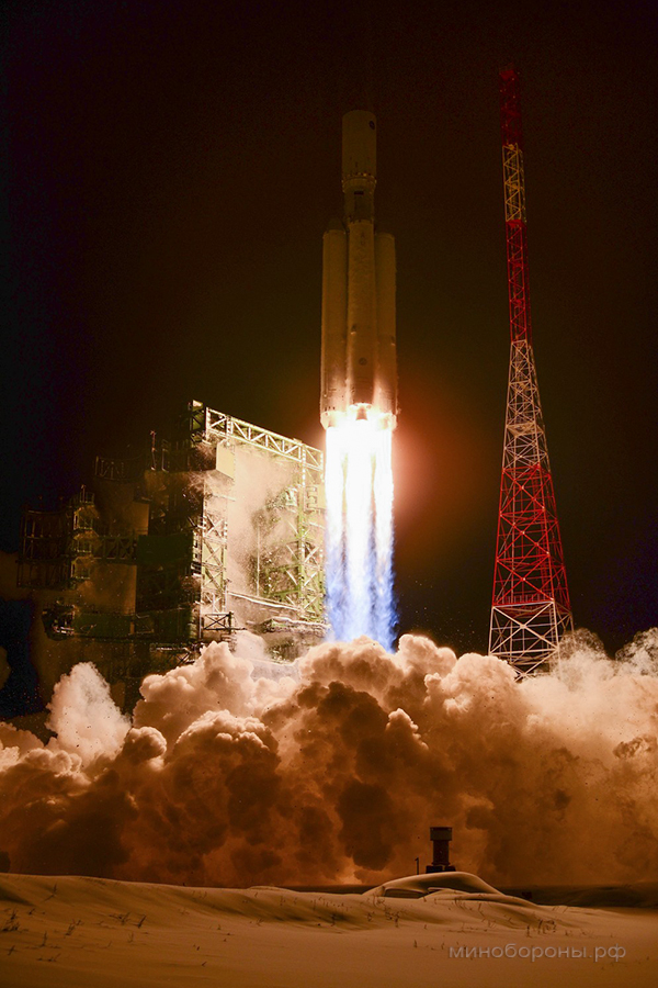 Первый испытательный пуск ракеты-носителя тяжелого класса «Ангара-А5» (космодром Плесецк, Архангельская обл.)